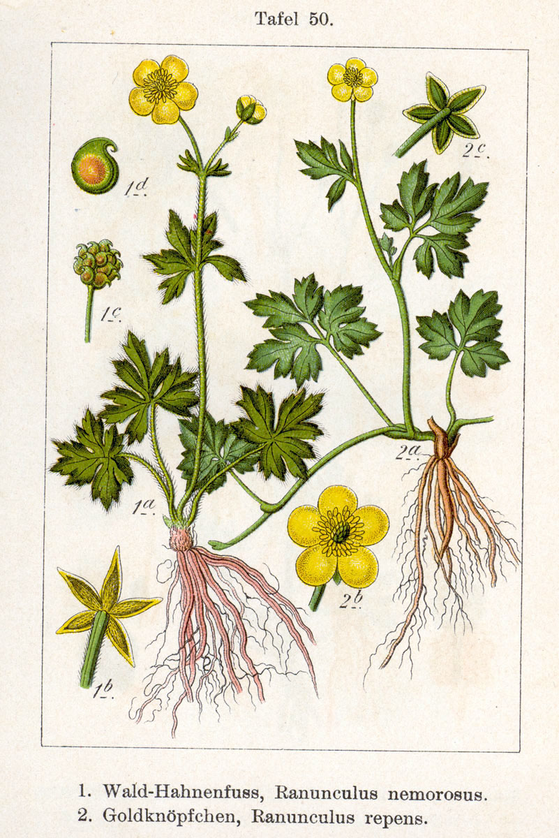 1. Ranunculus serpens subsp. nemorosus (DC.) G.López, syn. Ranunculus tuberosus Lapeyr., Ranunculus nemorosus DC. 2. Ranunculus repens L. Original Description 1. Wald-Hahnenfuss, Ranunculus nemorosus 2. Goldknöpfchen, Ranunculus repens